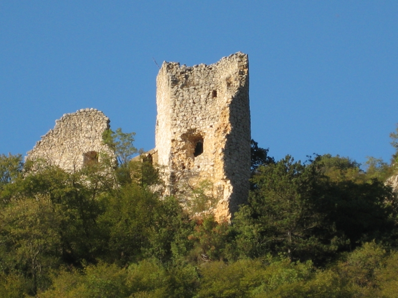 Gradina Grižane, Croatia